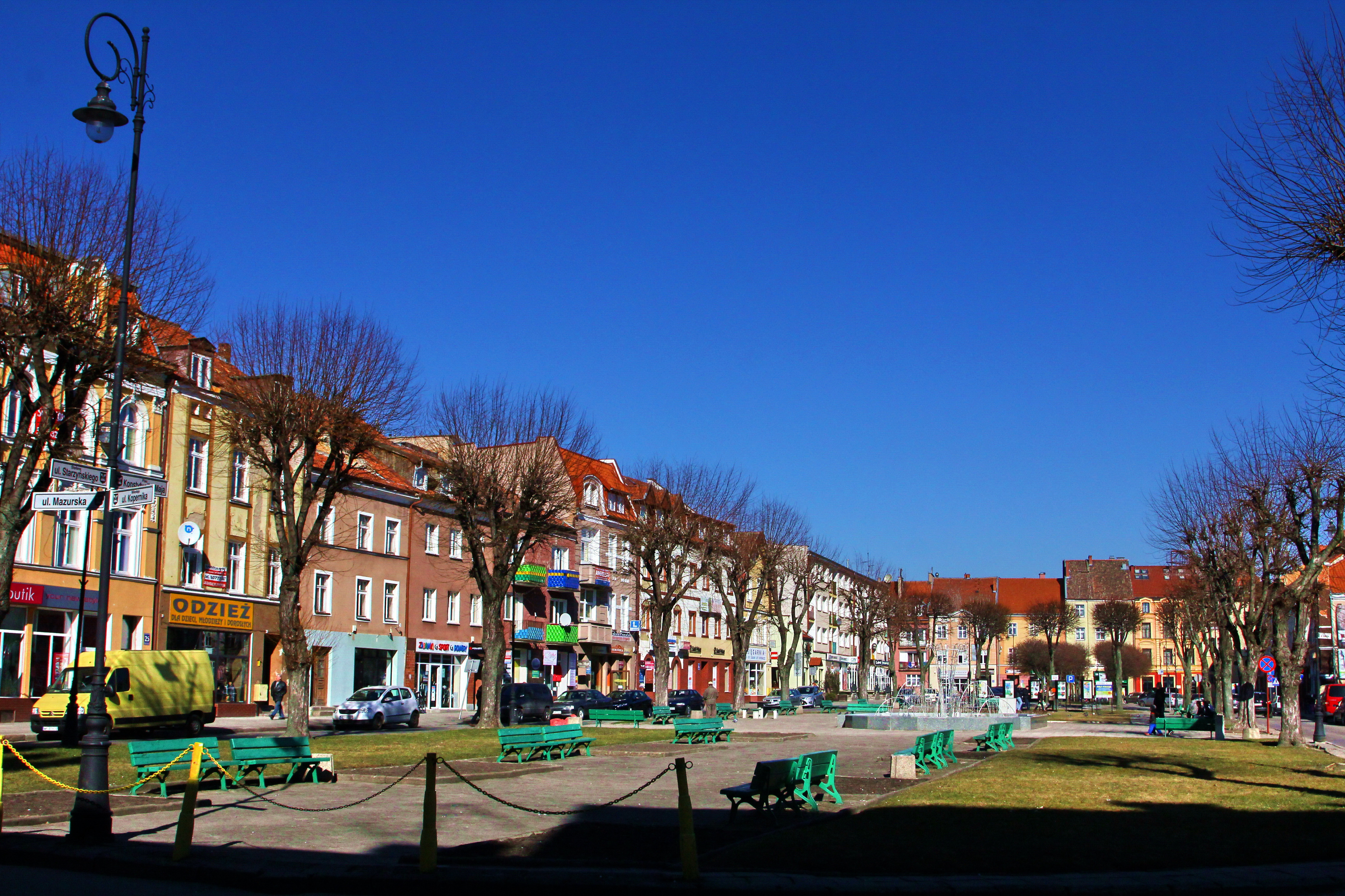 Bartoszyce. Widok na Plac Konstytucji 3 Maja spod Bramy Ldzbarskiej w kierunku NE.